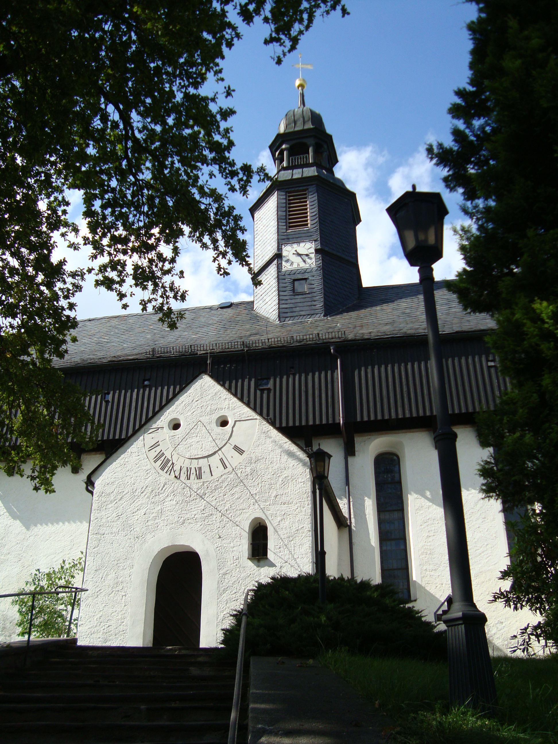 Wehrkirche in Pfaffroda OT Dörnthal im Erzgebirge